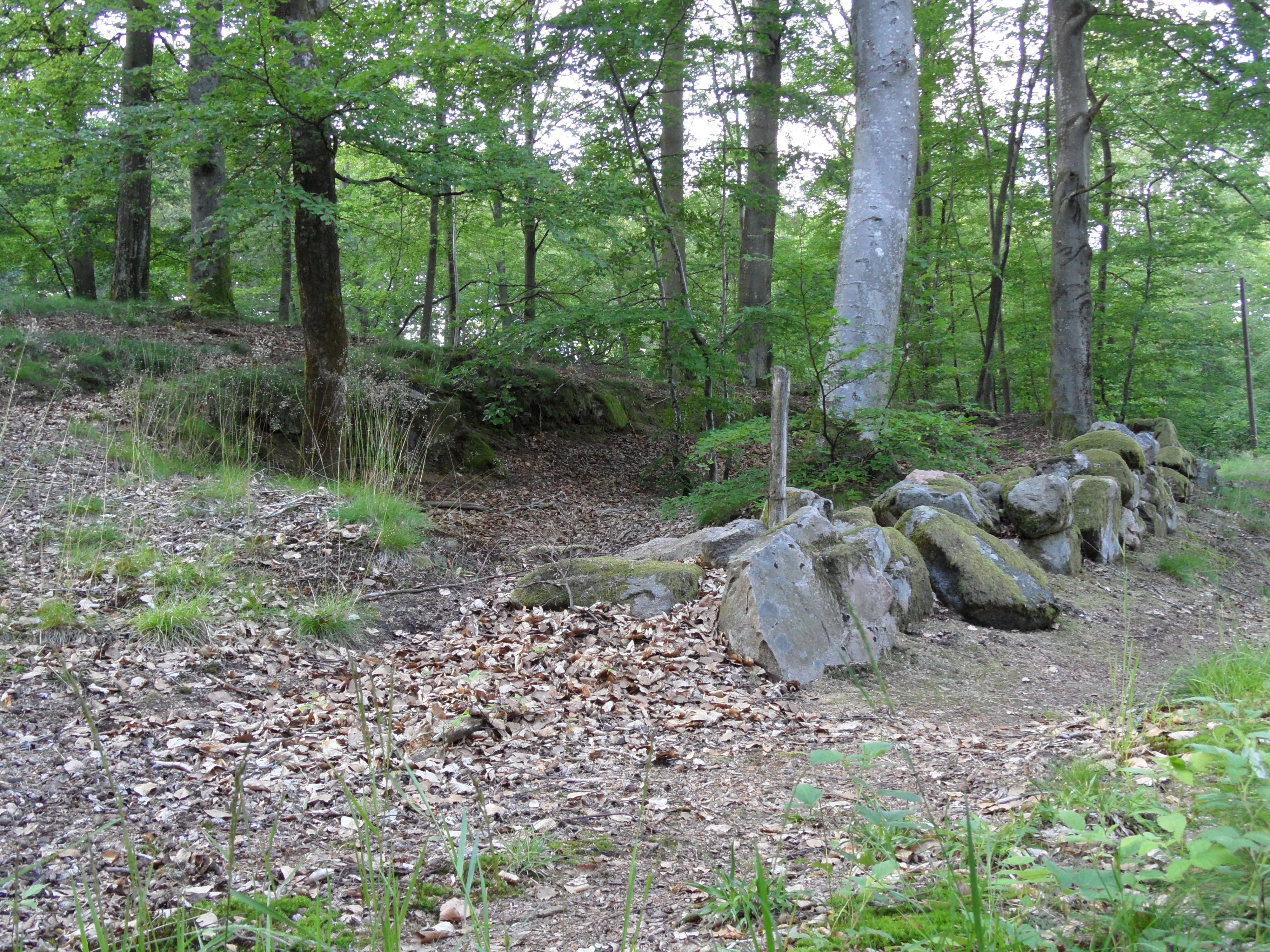 Bjära naturreservat